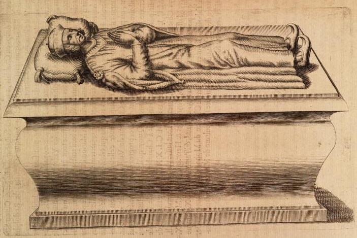 Humbert III. Savojský